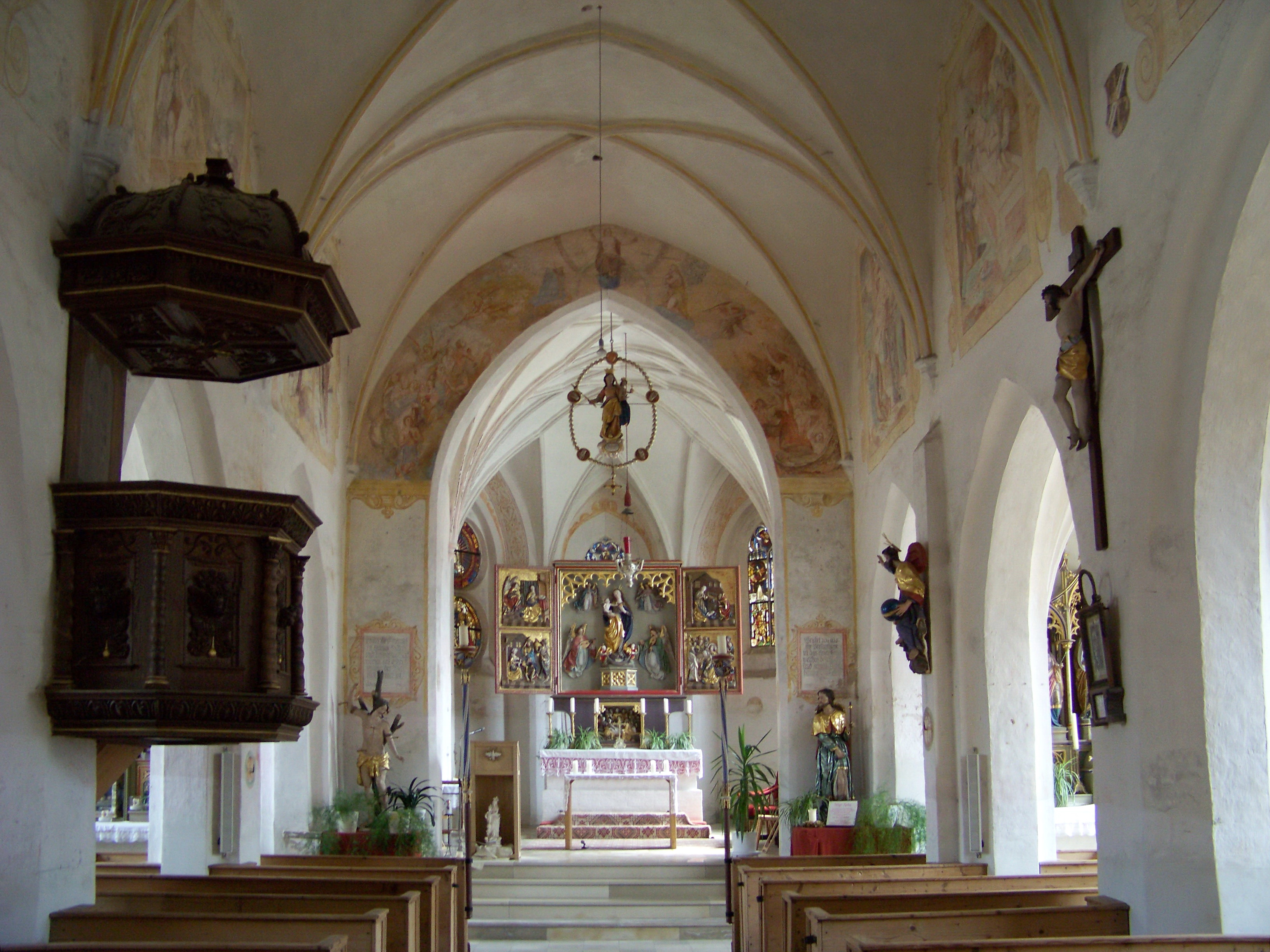 Adlkofen, Jenkofen 13. Katholische Kirche Mariä Himmelfahrt. Staffelhalle mit eingezogenem Chor. Mittelschiff mit etwas breiterem Chorraum.